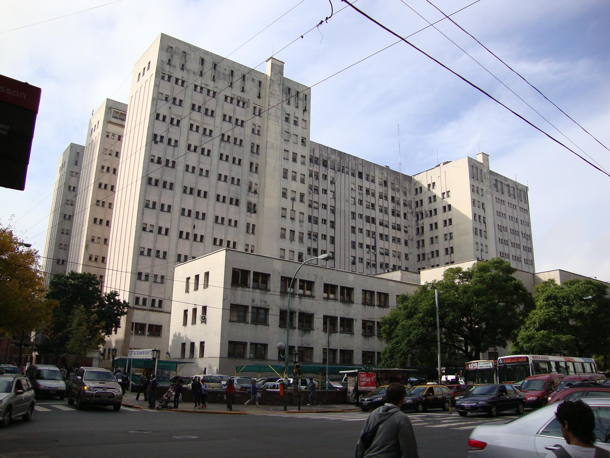 Vista del edificio del Hospital de Clínicas "José de San Martín", parte de la Universidad de Buenos Aires, como Hospital-Escuela. Buenos Aires, Argentina.